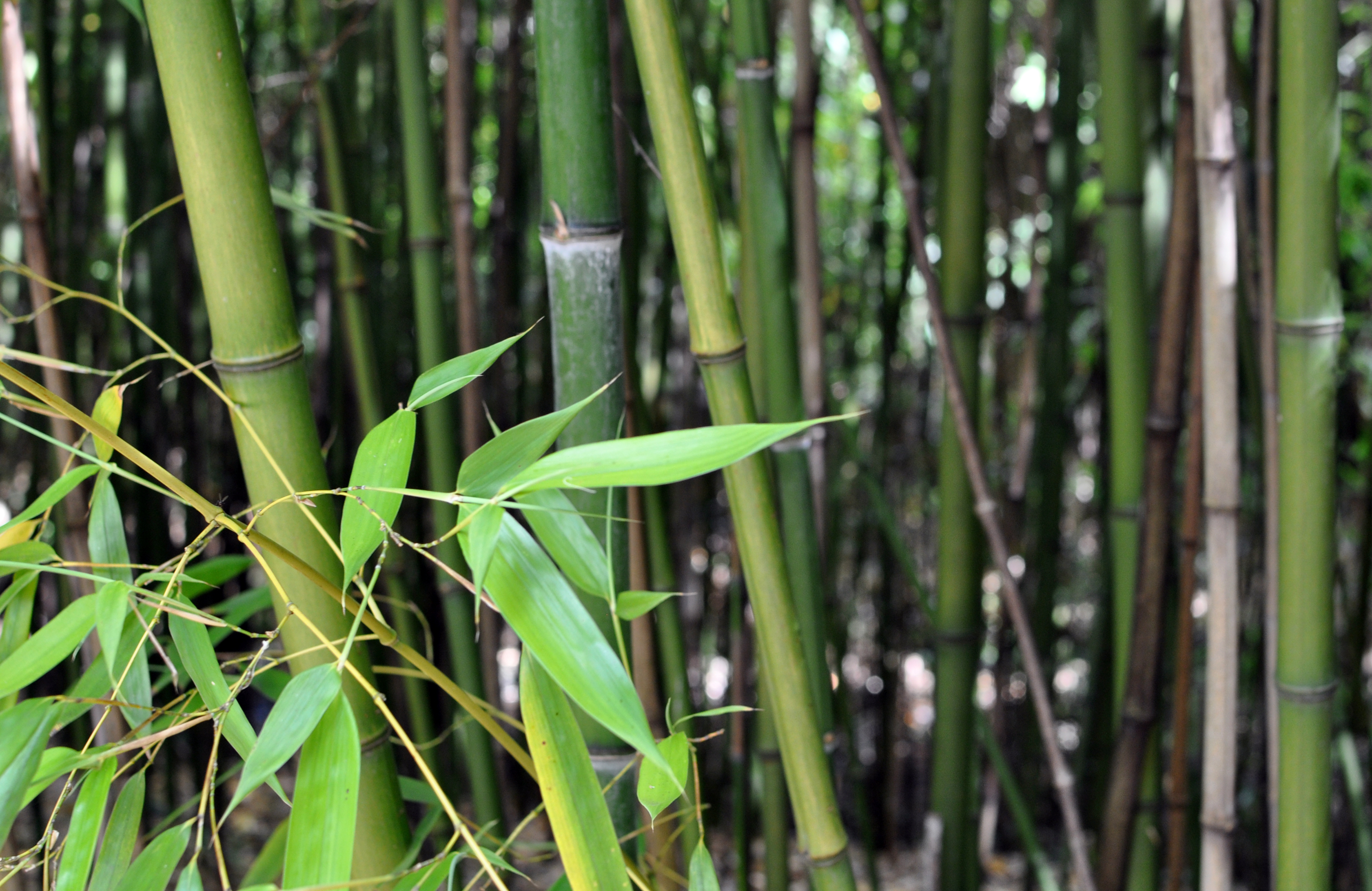 Phyllostachys viridiglaucescens at Conservatoire botanique national de Brest. Conservatoire botanique national de Brest Native nameConservatoire botanique national de BrestLocationBrest, France, FranceCoordinates48° 24′ 10″ N, 4° 26′ 54″ W Established1975: established, 1978: opened to publicWebsite